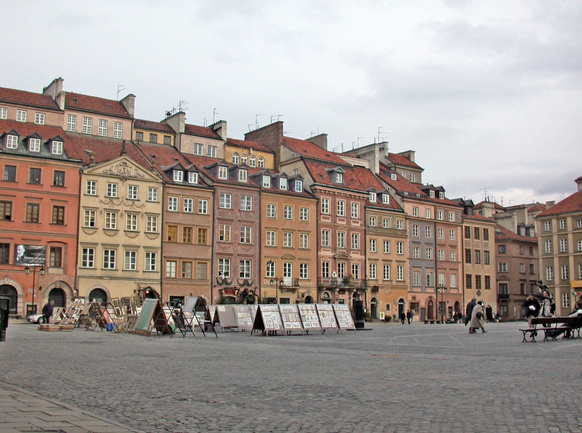 Varsavia, Piazza del Mercato della Città Vecchia (Rynek Starego Miasta), angolo orientale (tra lato Barss e un pezzetto del lato Zakrzewki).